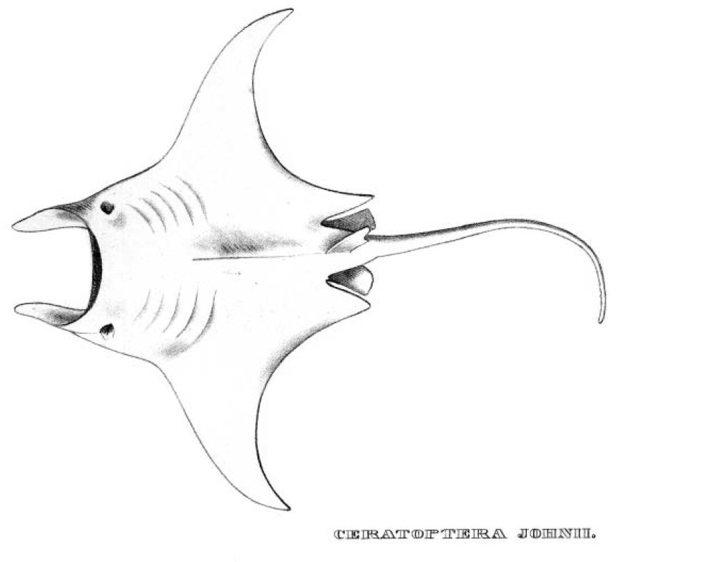 Гигантская манта Manta birostris syn. Mobula birostris syn. Ceratoptera johnii